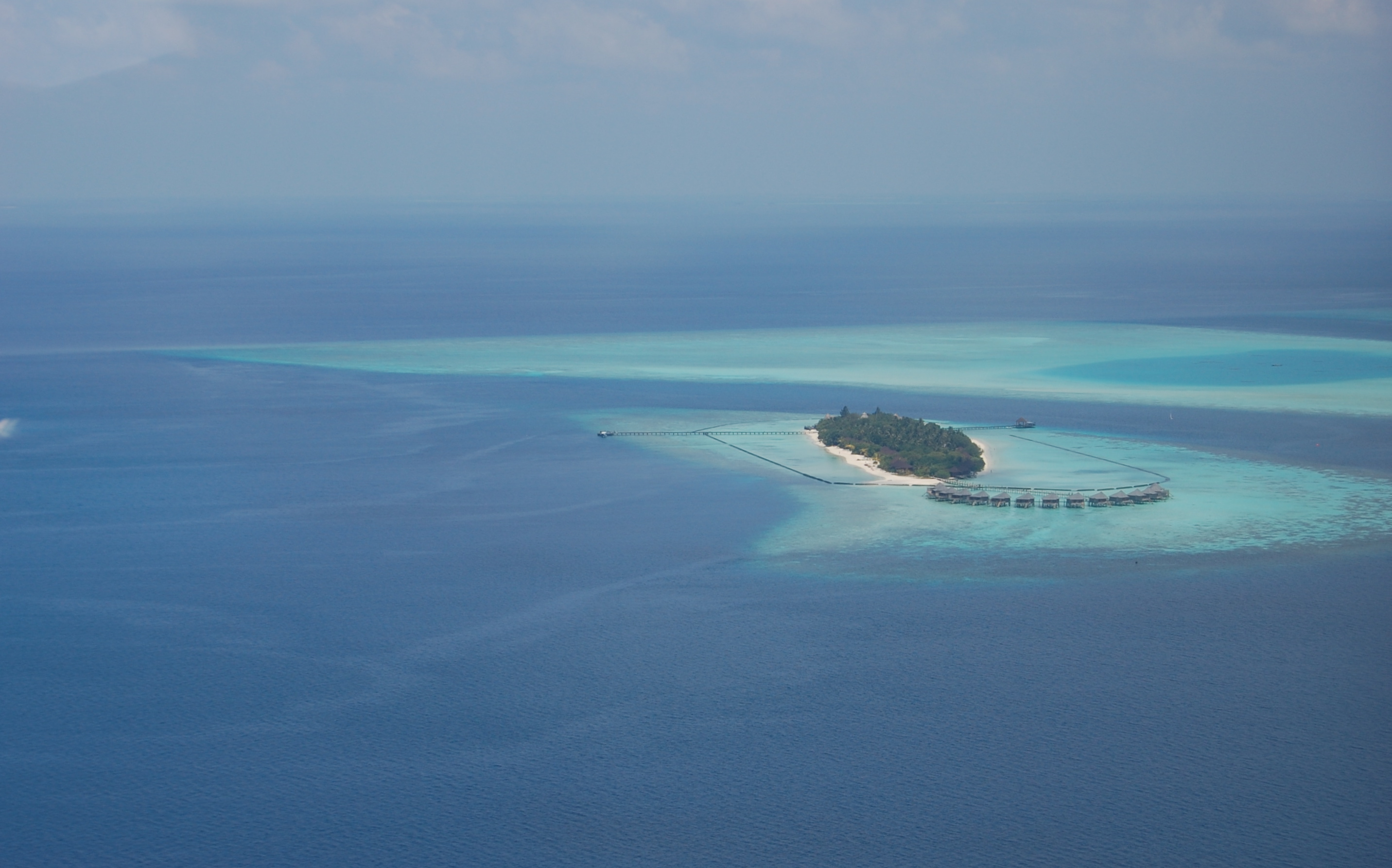 Komandoo (Lhaviyani Atoll)